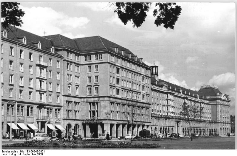 Dresden, „Alter Markt“, Neubau Zentralbild Repro 4.9.1959 Wiederaufbau der Stadt Dresden. UBz: Altmarkt Westseite. An dieser Stelle wurde 1952 mit dem Aufbau des Zentrums begonnen. Die Gebäude enthalten 2-geschossige Läden, darüber Wohnungen. In dem vorderen vorgezogenen Bauteil befindet sich das „Cafe Prag“. Abschluß der Gebäudegruppe durch das HO-Warenhaus (Hintergrund).